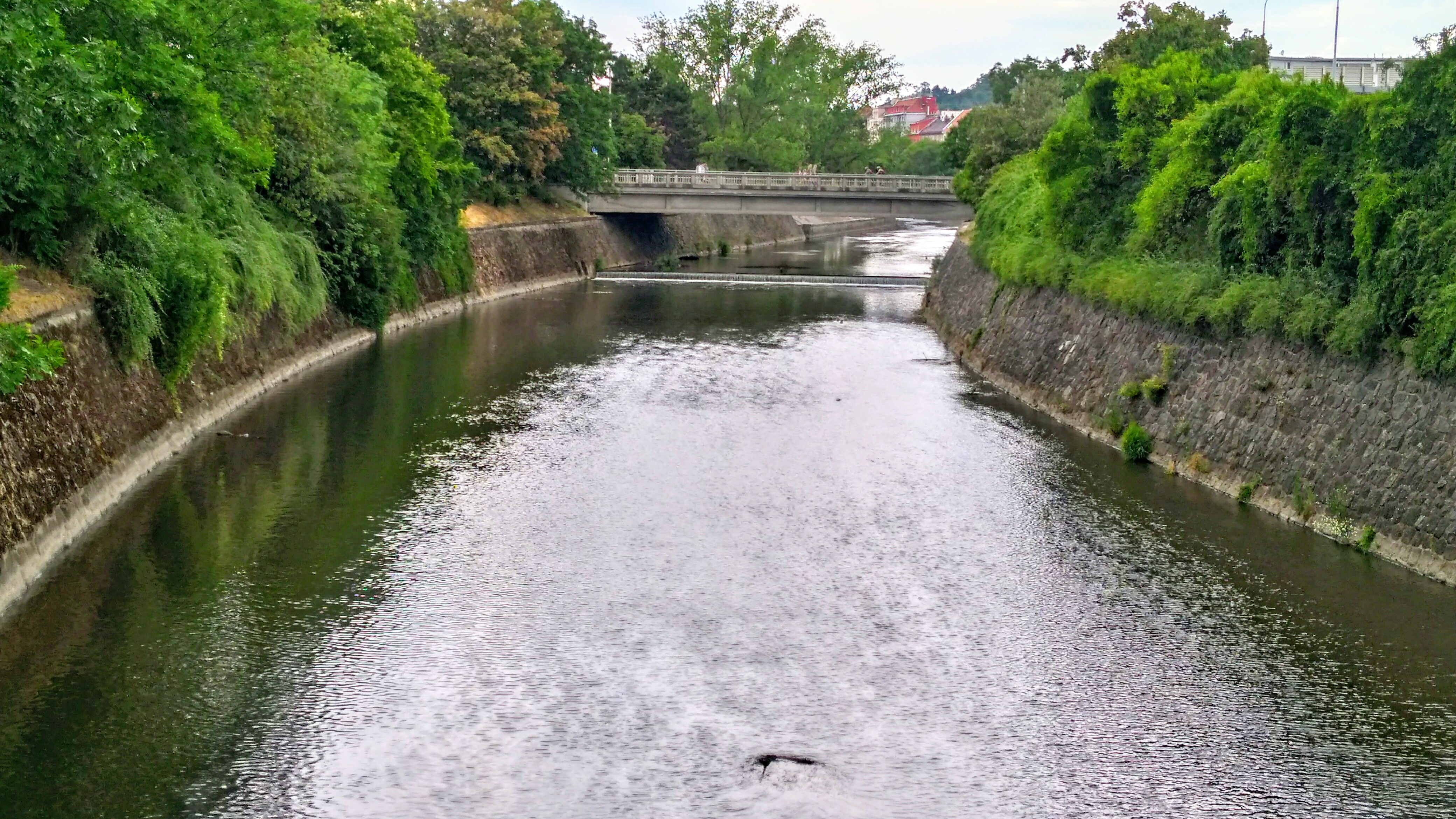 Řeka.